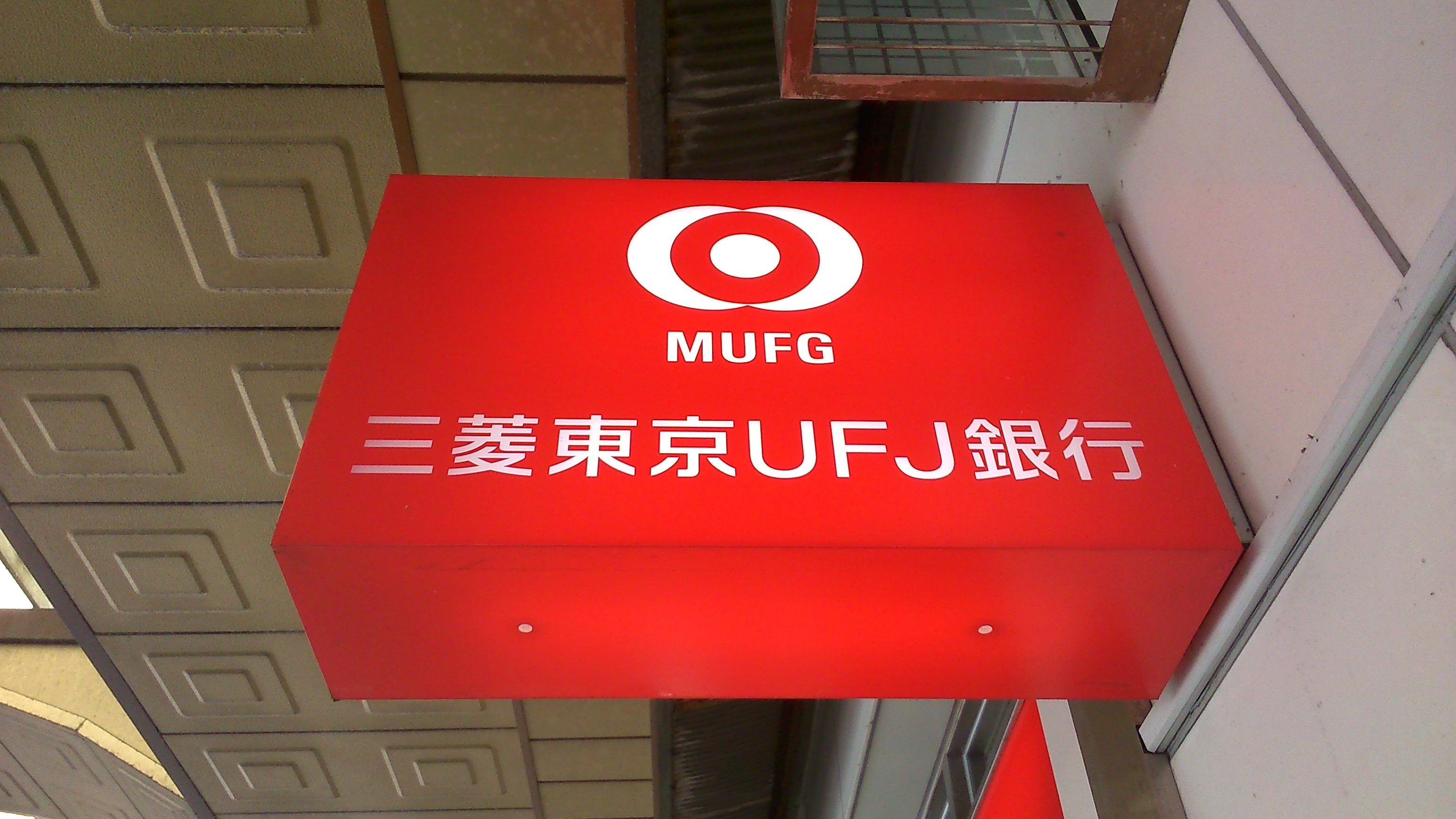 明石支店 の看板